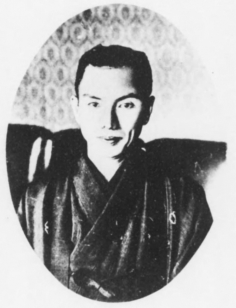 伊藤次郎左衛門の肖像。名古屋勧業協会 編『御大典奉祝名古屋博覧会総覧』名古屋勧業協会、1929年8月31日（国立国会図書館デジタルコレクションによる）